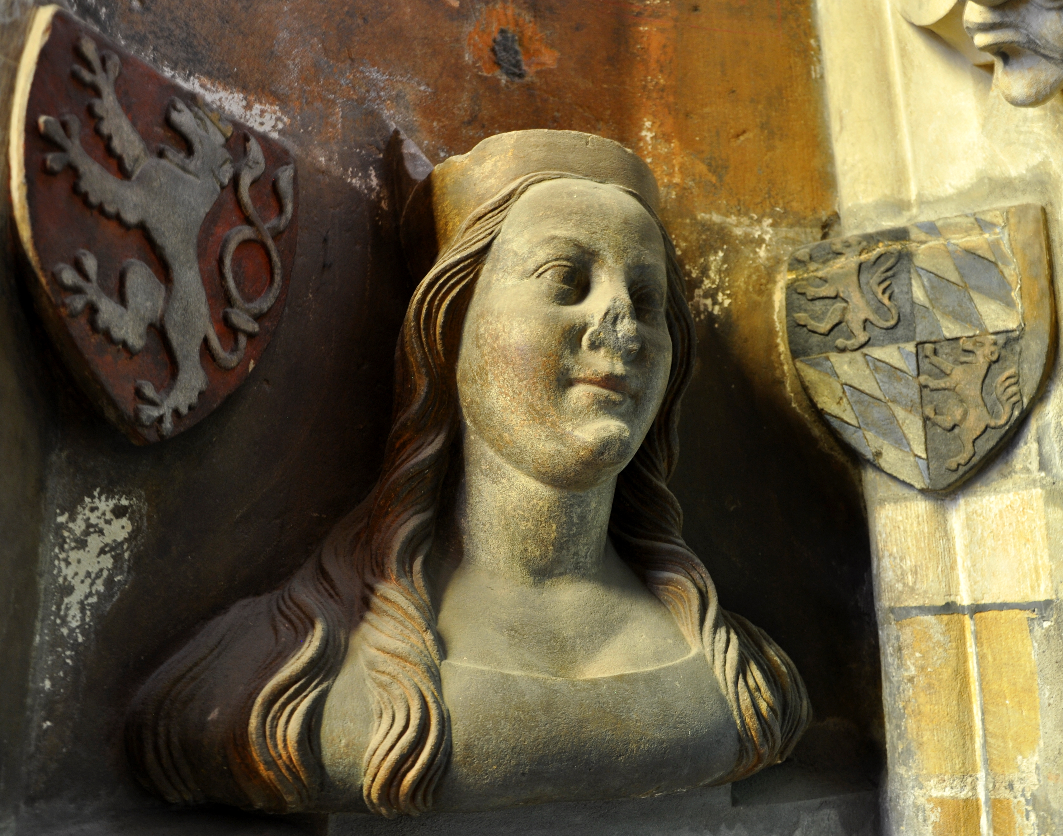 Anna von der Pfalz, Königin von Böhmen, Veitsdom, Prag.